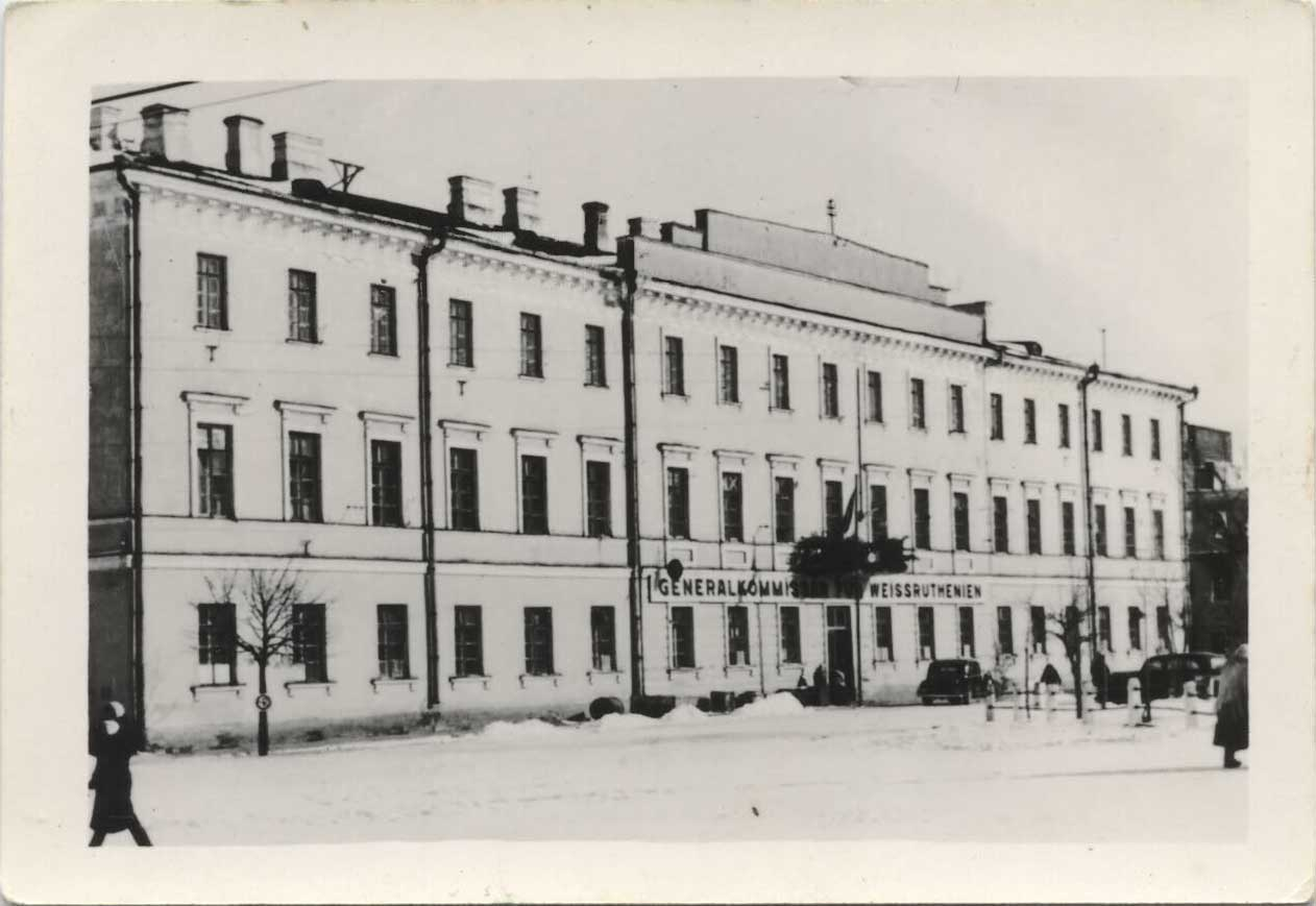 Беларуская (тарашкевіца): Менск (Miensk), пляц Высокі Рынак (plac Vysoki Rynak). Манастыр базылянаў, перабудаваны ўладамі Расейскай імпэрыі пад прысутныя месцы